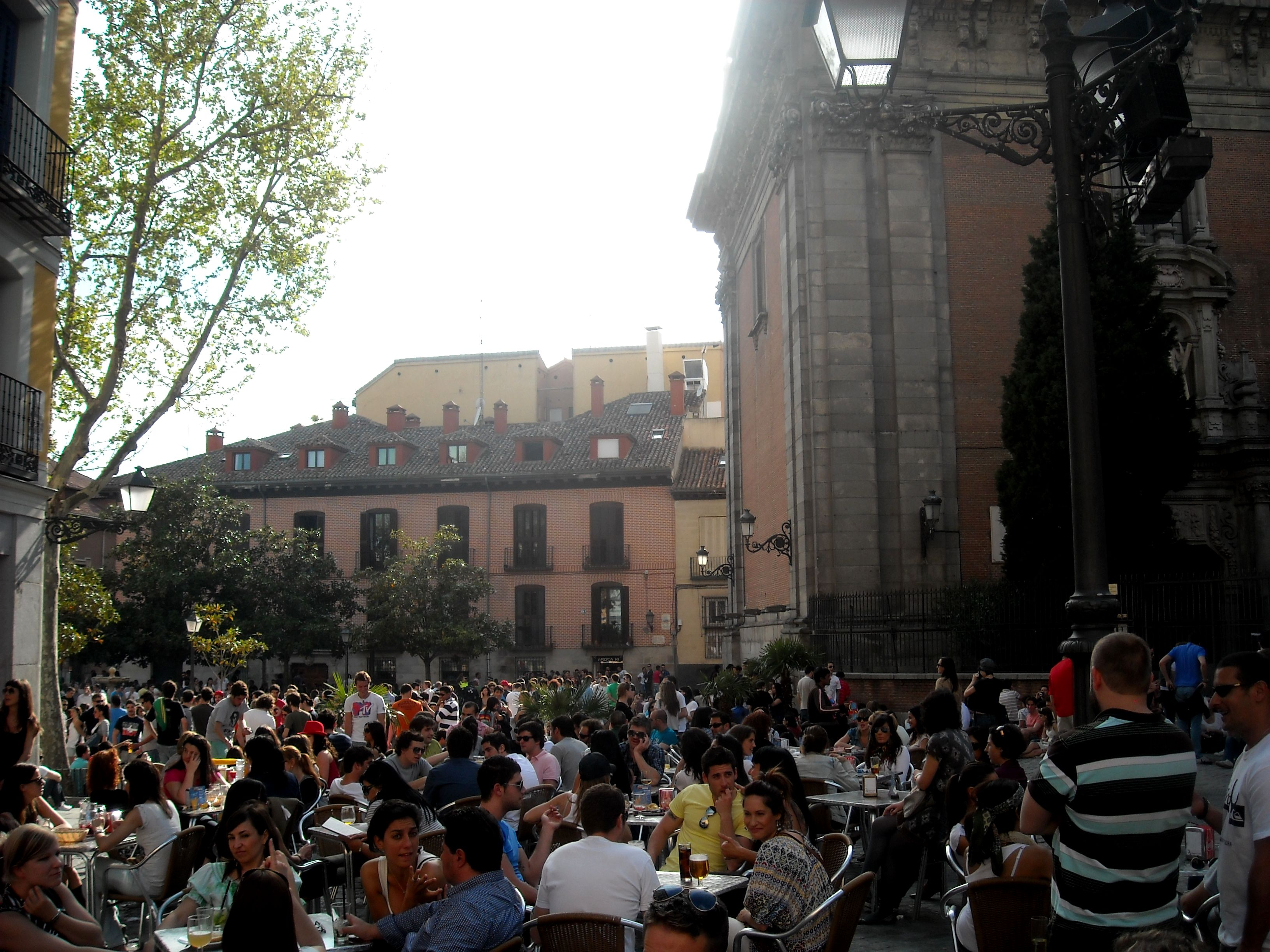 Terrazas de Domingo en La Latina los primeros días de primavera